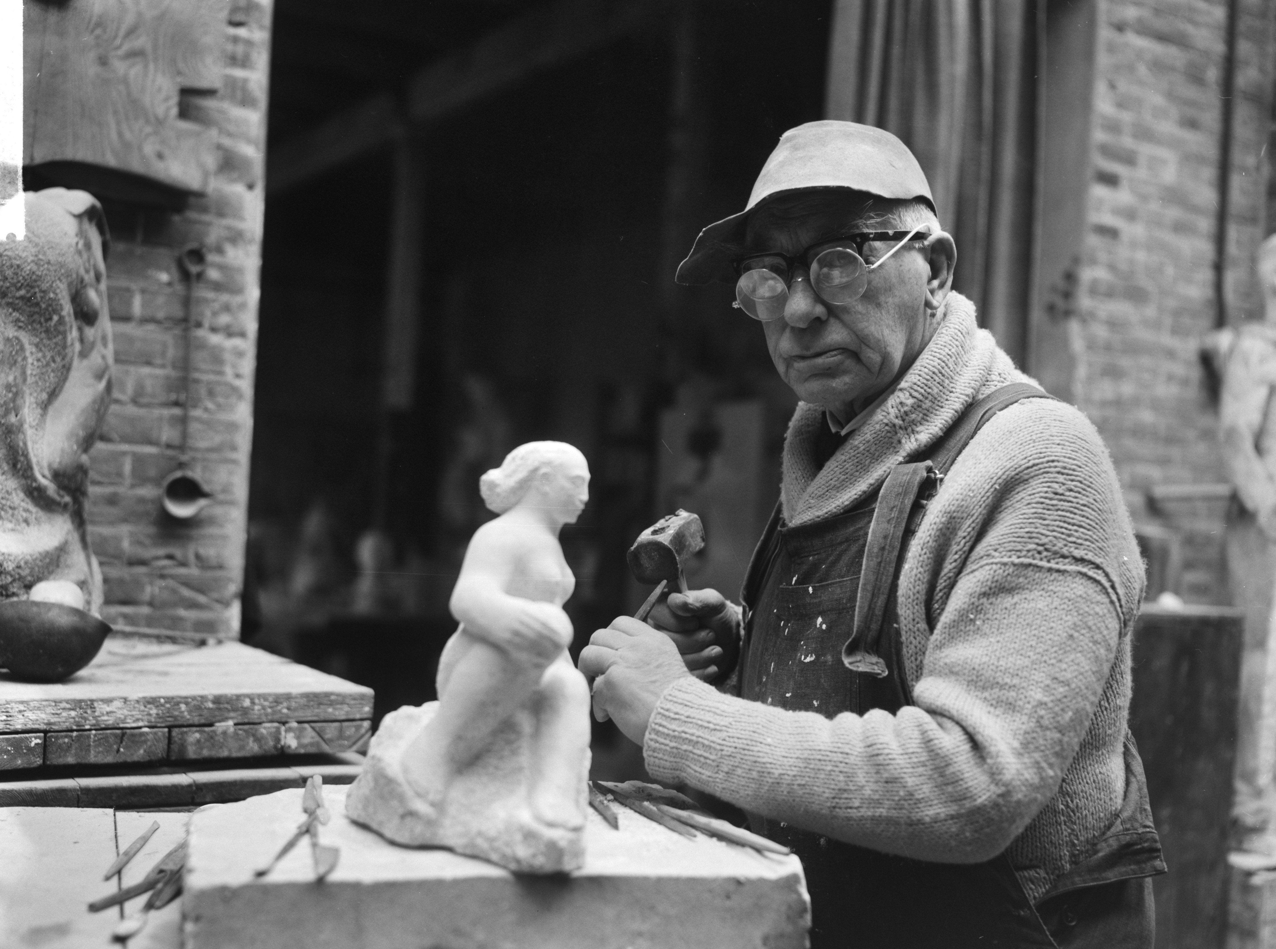 Collectie / Archief : Fotocollectie Anefo Reportage / Serie : [ onbekend ] Beschrijving : Hildo Krop 26 januari 80 jaar, Hildo Krop in zijn atelier Datum : 19 februari 1964 Trefwoorden : ateliers, beeldhouwers, beeldhouwkunst, kunstenaars Persoonsnaam : Krop, Hildo Fotograaf : Bilsen, Joop van / Anefo Auteursrechthebbende : Nationaal Archief Materiaalsoort : Negatief (zwart/wit) Nummer archiefinventaris : bekijk toegang 2.24.01.04 Bestanddeelnummer : 916-0689 Reacties Geplaatst door Kunstliefhebber op 08 september 2016 - 14:59. Hildo Krop 26 februari 80 jaar, Hildo Krop in zijn atelier Locatie: Plantage Muidergracht Plaats: Amsterdam, Noord-Holland NB. januari dient februari te zijn. Hij werd geboren op 26 februari 1884.